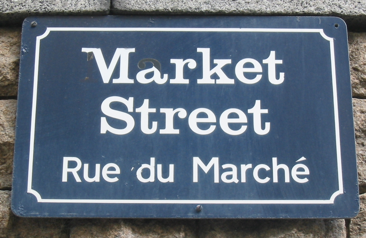 Market Street, Guernsey